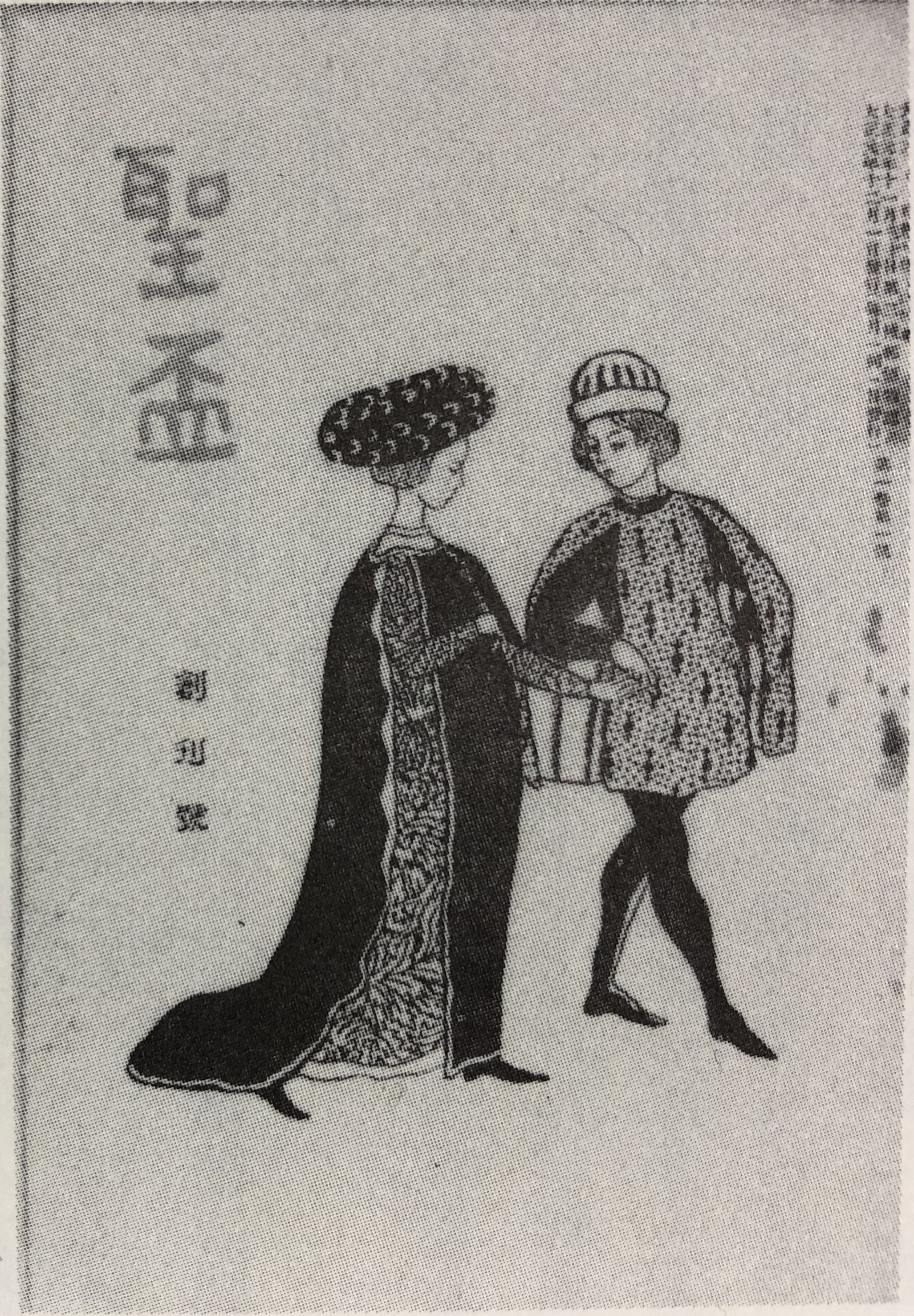 日夏耿之介らによる同人誌（『サバト恠異帖』国書刊行会より）